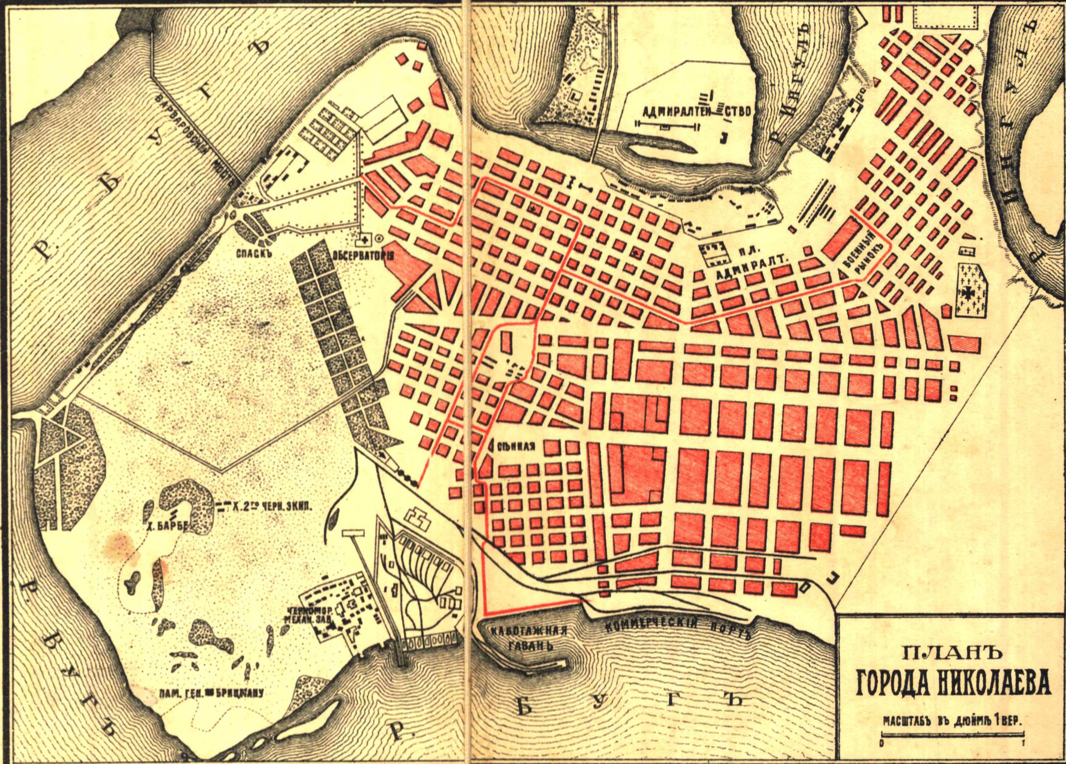 «Планъ города Николаева» 1903 года с дополнениями 1910 года. Обозначены линии конки.